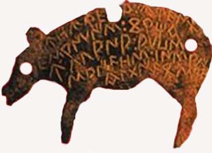 Tesera de Hospitalidad celtíbera, encontrada en Uxama (Osma, Soria, España). Depositada en el Museo Numantino de Soria.